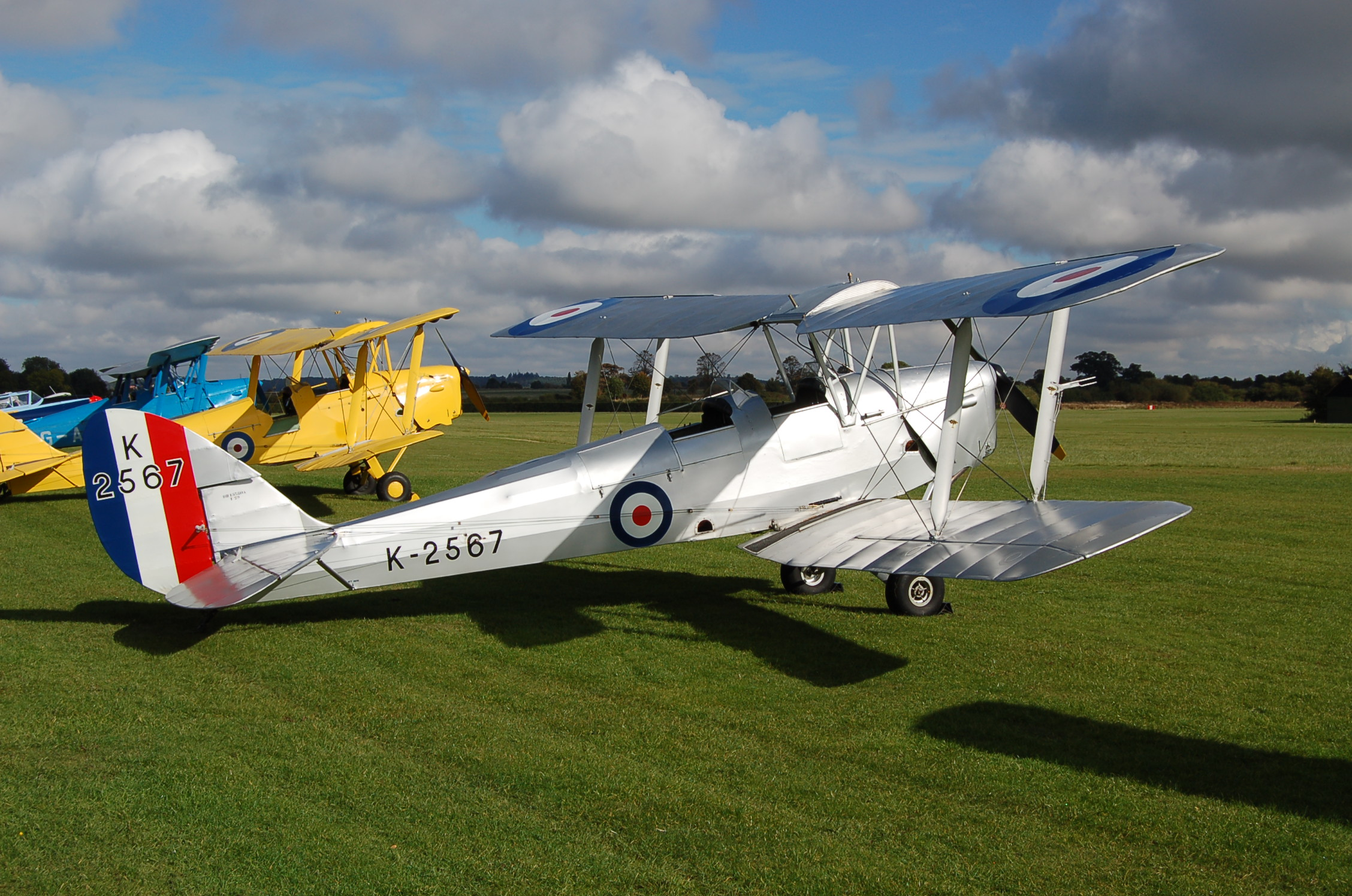 de Havilland Tiger Moth at Old Warden,Beds.,13/10/12.